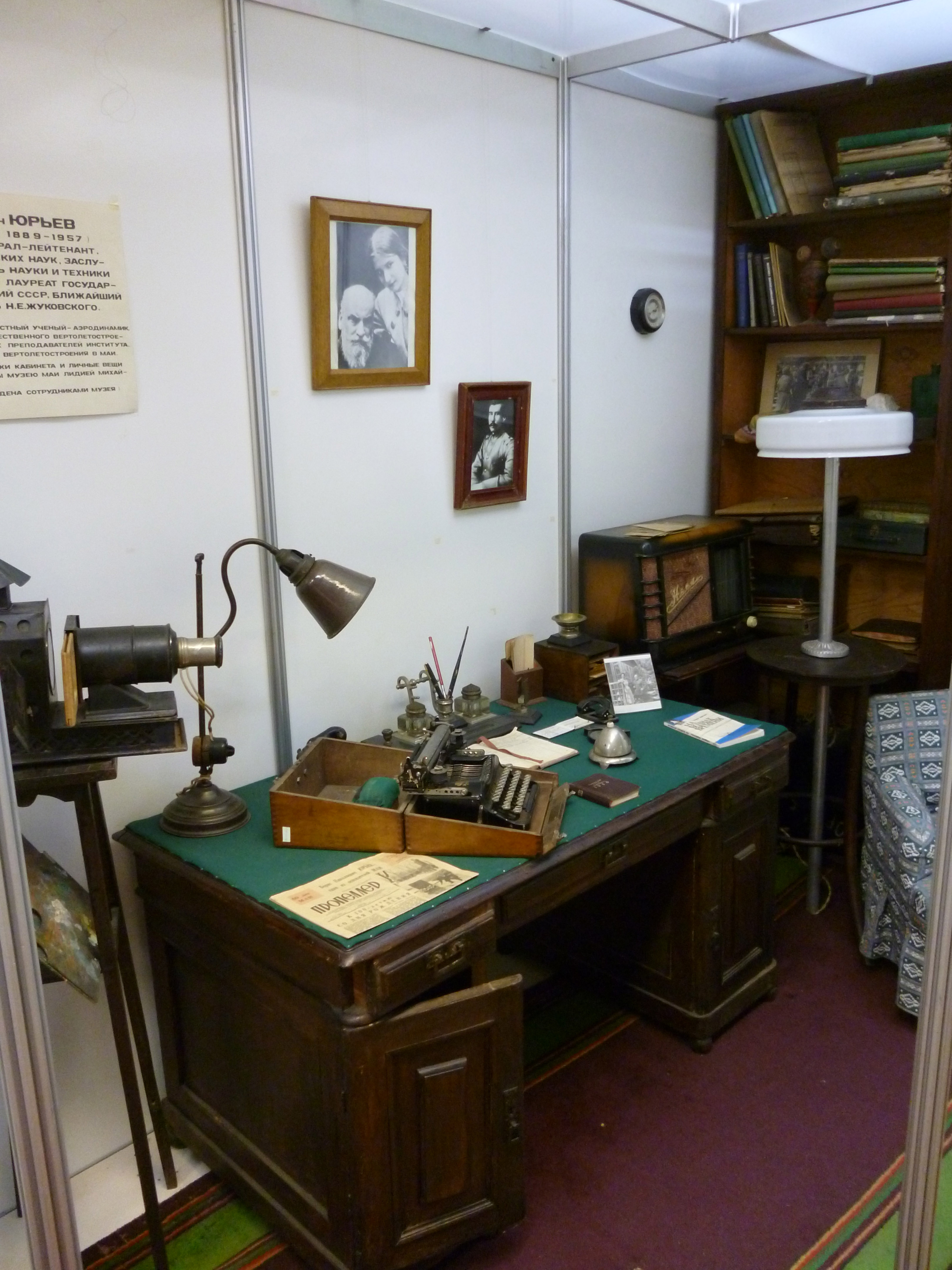 Кабинет Бориса Николаевича Юрьева в музее МАИ